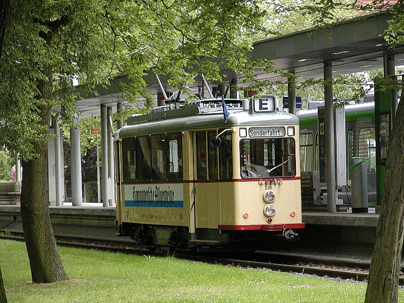 Eine alte Straßenbahn in Hannover